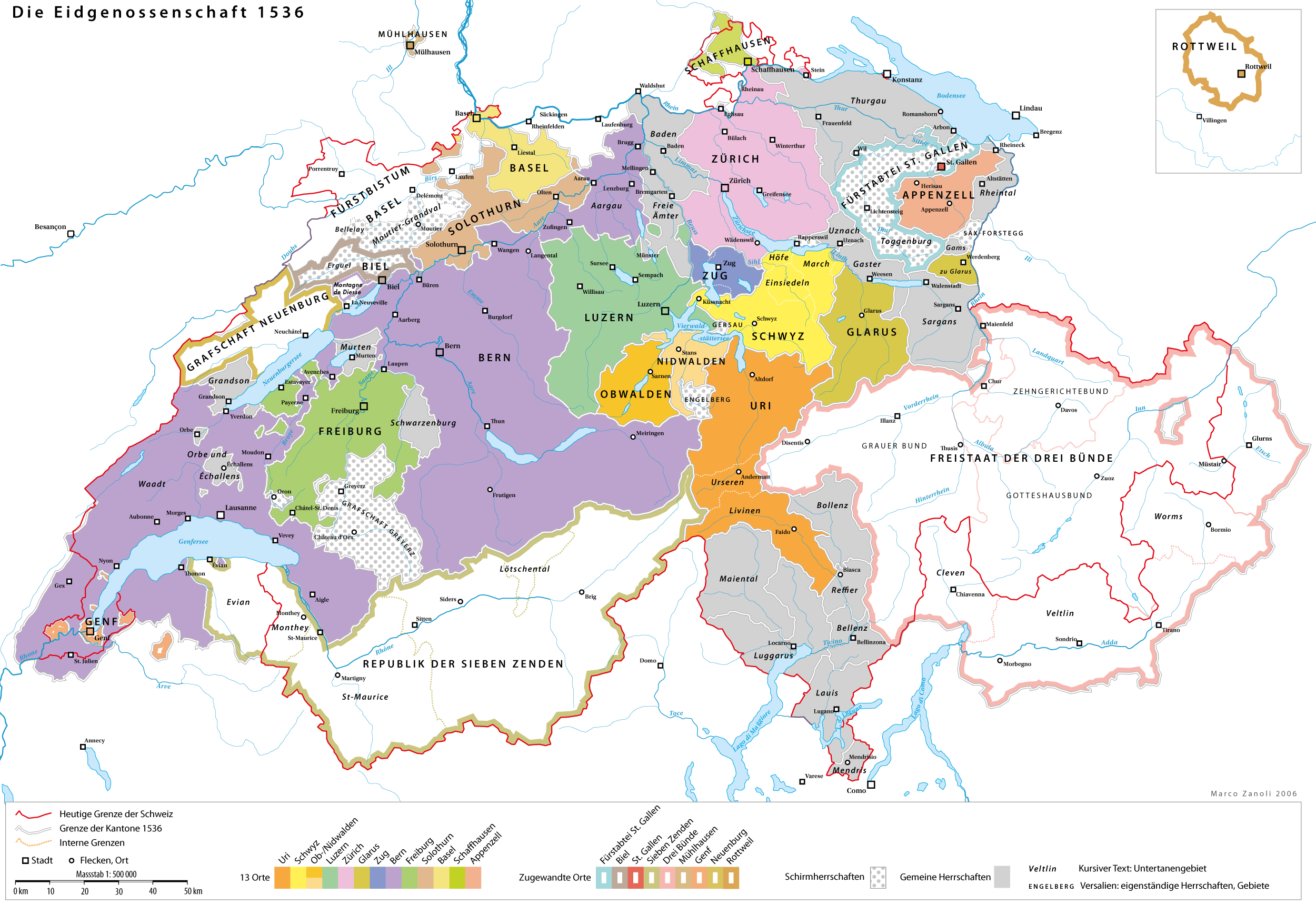 Die schweizerische Eidgenossenschaft um 1536 nach der Eroberung der Waadt durch Bern und Freiburg.